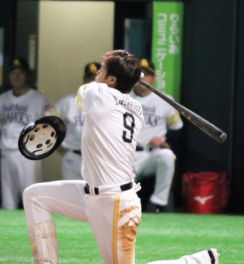 ヘルメットが脱げるほどの強振(2017/10/29日本シリーズ第二戦)